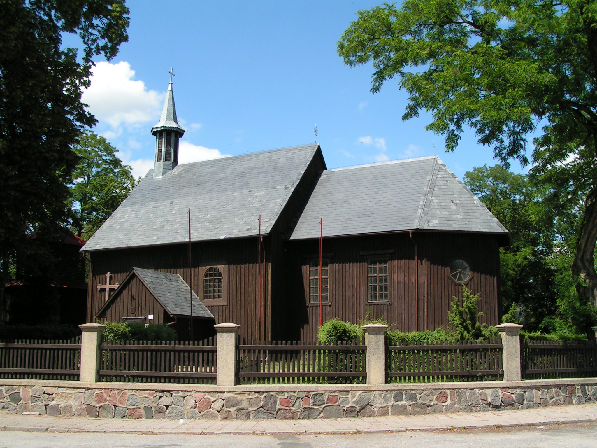 Gąsawa, modrzewiowy kościółek z XVII w.